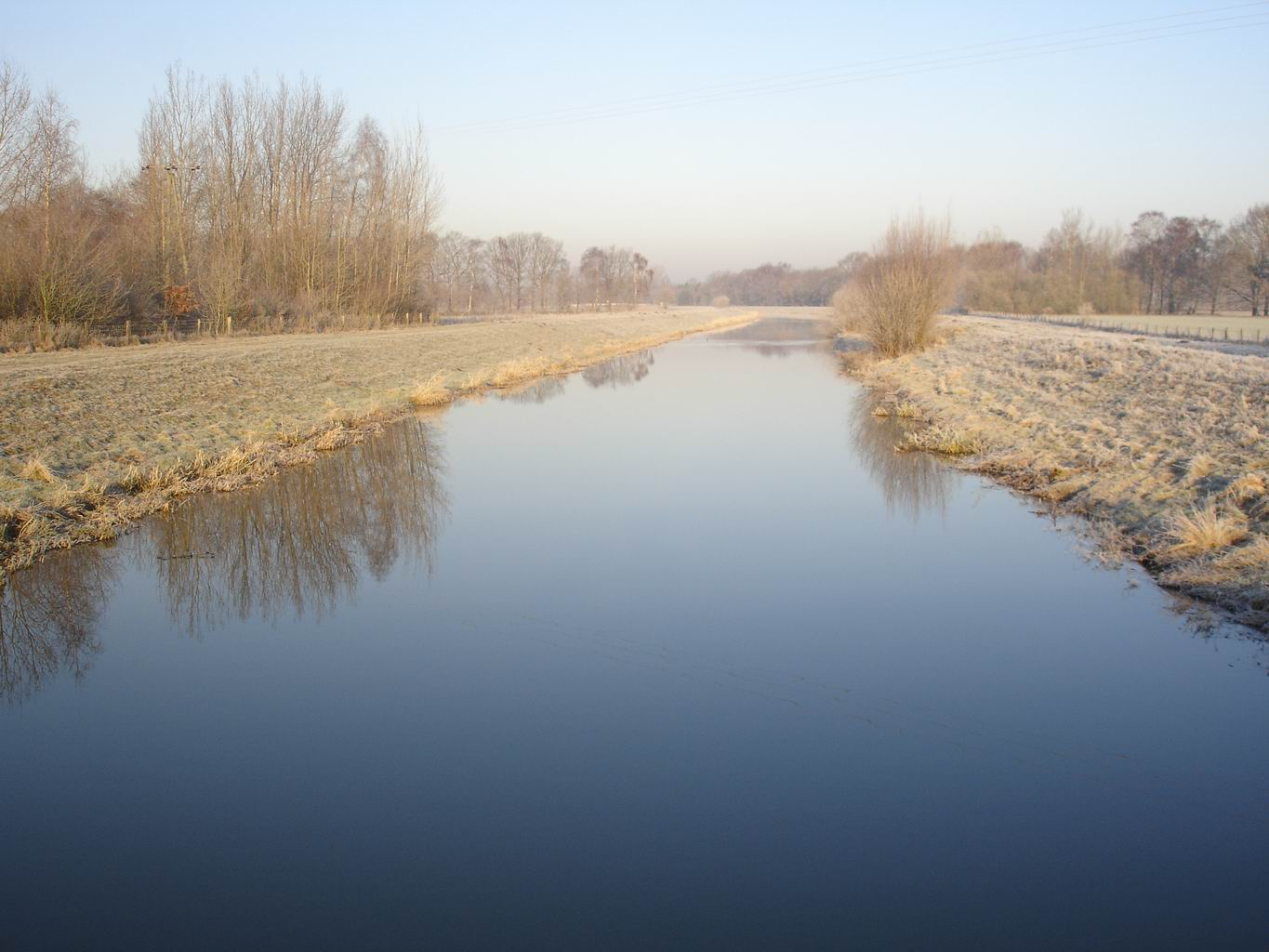 Die Hase in Sögeln (Bramsche / Osnabrücker Land) - Blick Richtung Hesepe (Flussaufwärts) Fotografiert: 2006:01:14 09:52:39 TXm Kamera: SONY DSC-P200 Belichtungszeit 1/160 s Originale Auflösung: 3072x2304 Pixel